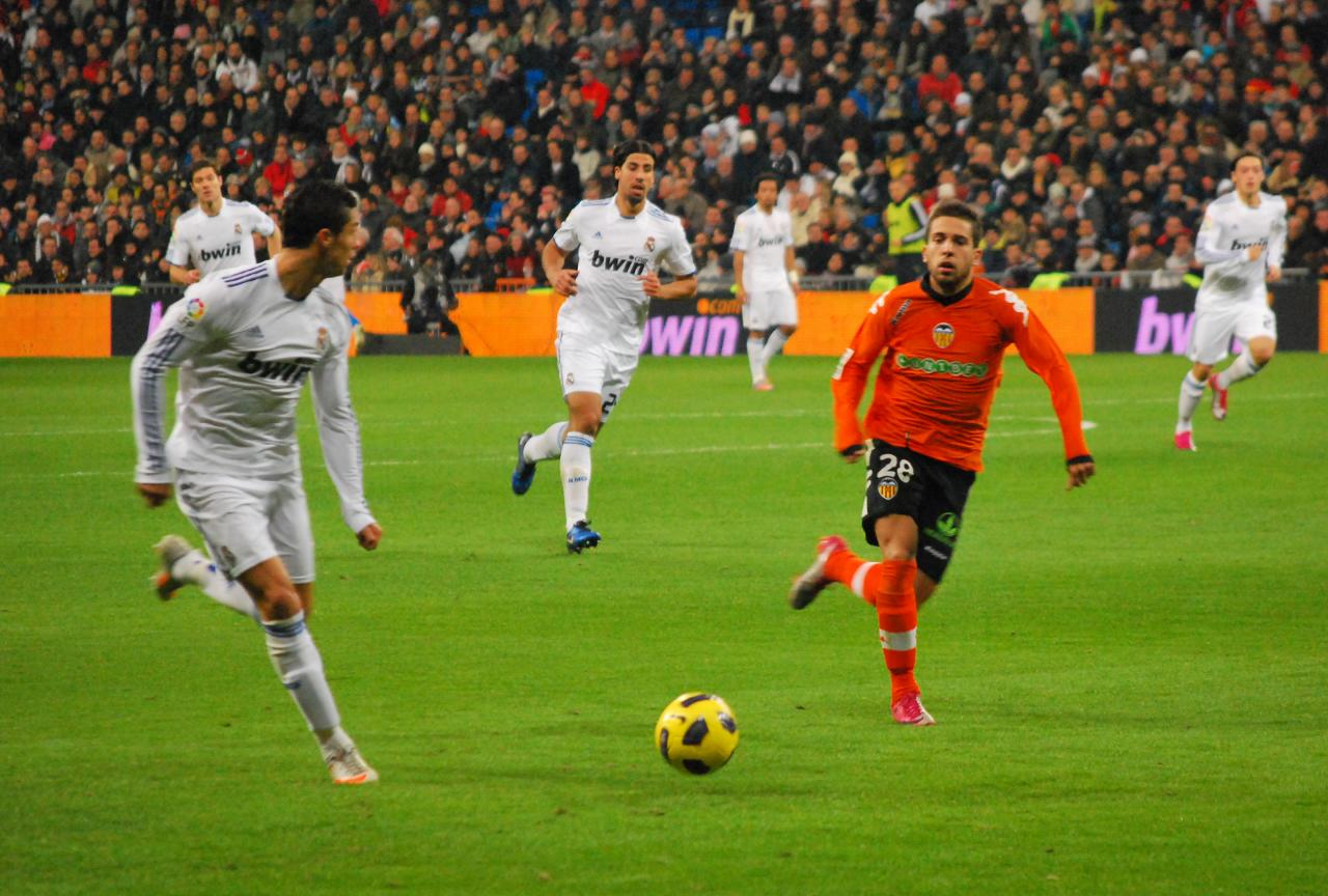 Partit de lliga del 4 de desembre de 2010 R. Madrid 2-0 València CF